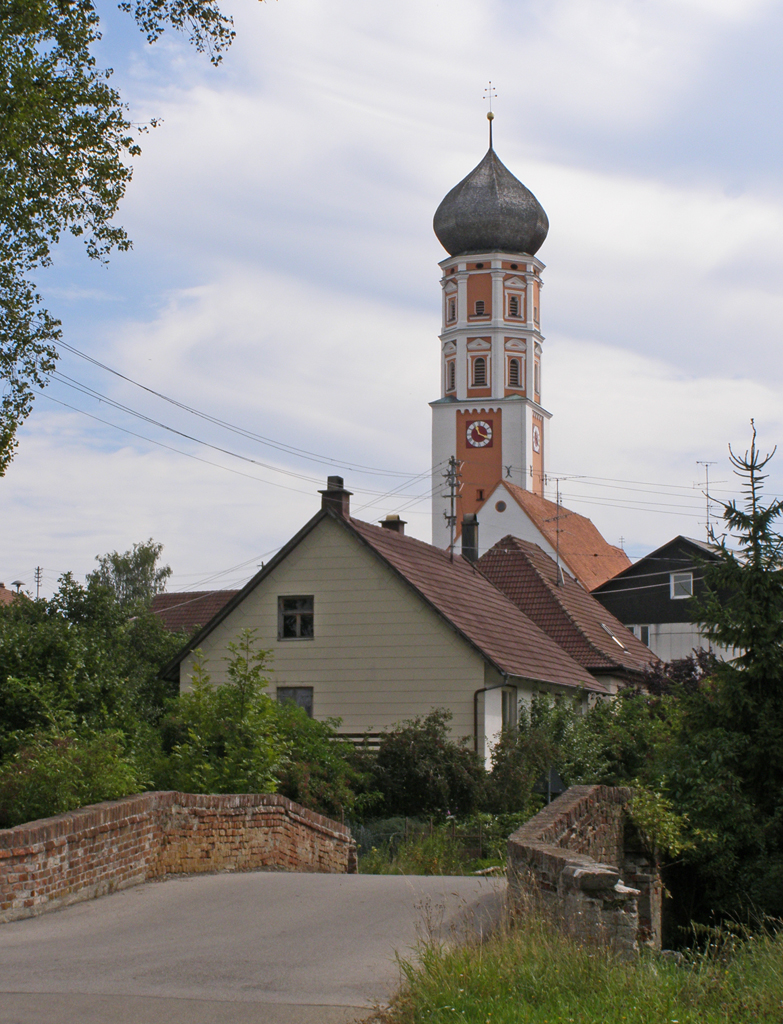 Kammlach (Unterallgäu) - Oberkammlach Kirche "Maria Himmelfahrt" mit Reichsbrücke